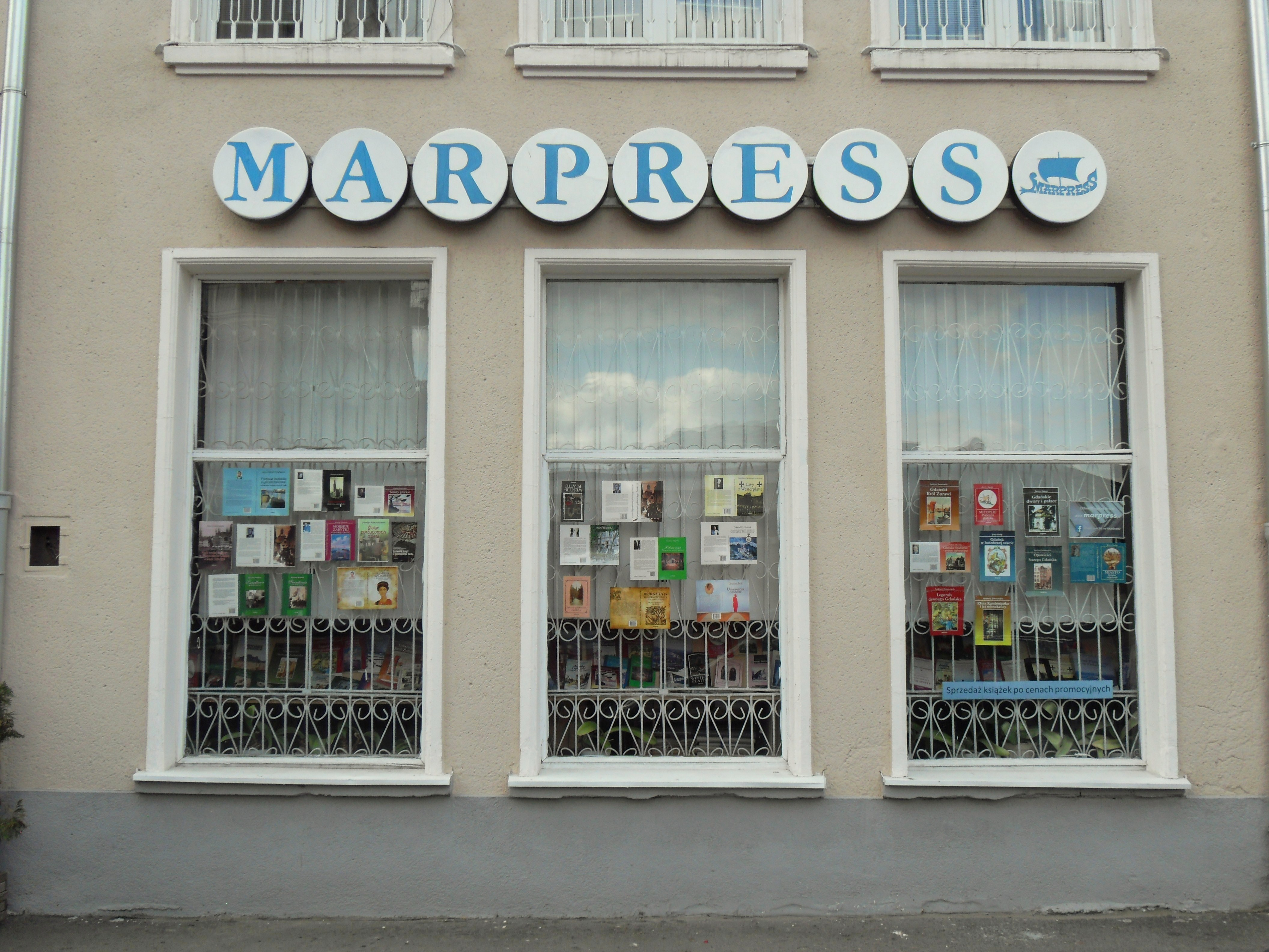 Gdańsk Główne Miasto, Targ Rybny 10B, "Marpress".